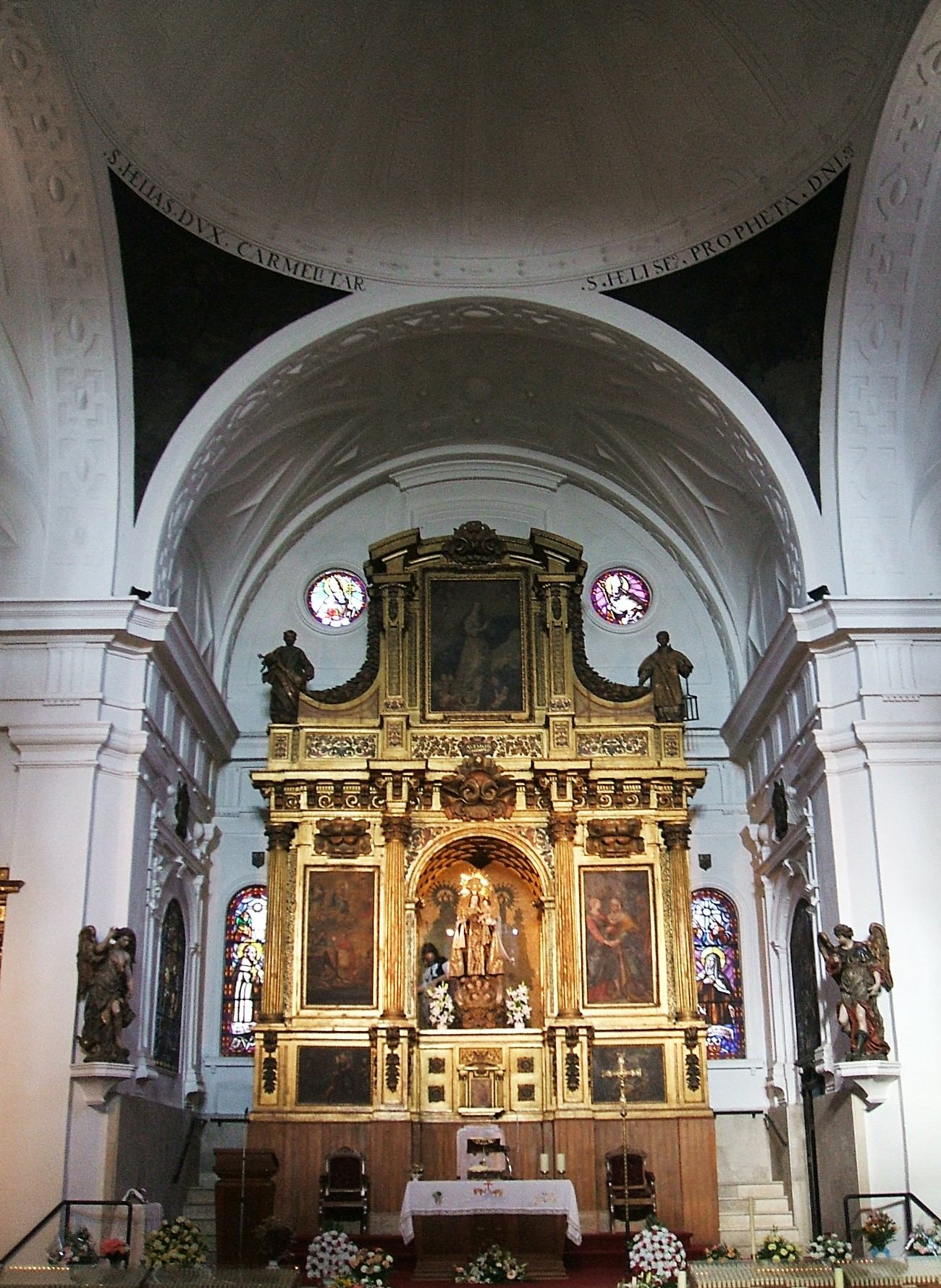 Cabecera de la Iglesia (antiguo convento del Carmen Descalzo) de Nuestra Señora del Carmen Extramuros, Valladolid, España/Spain